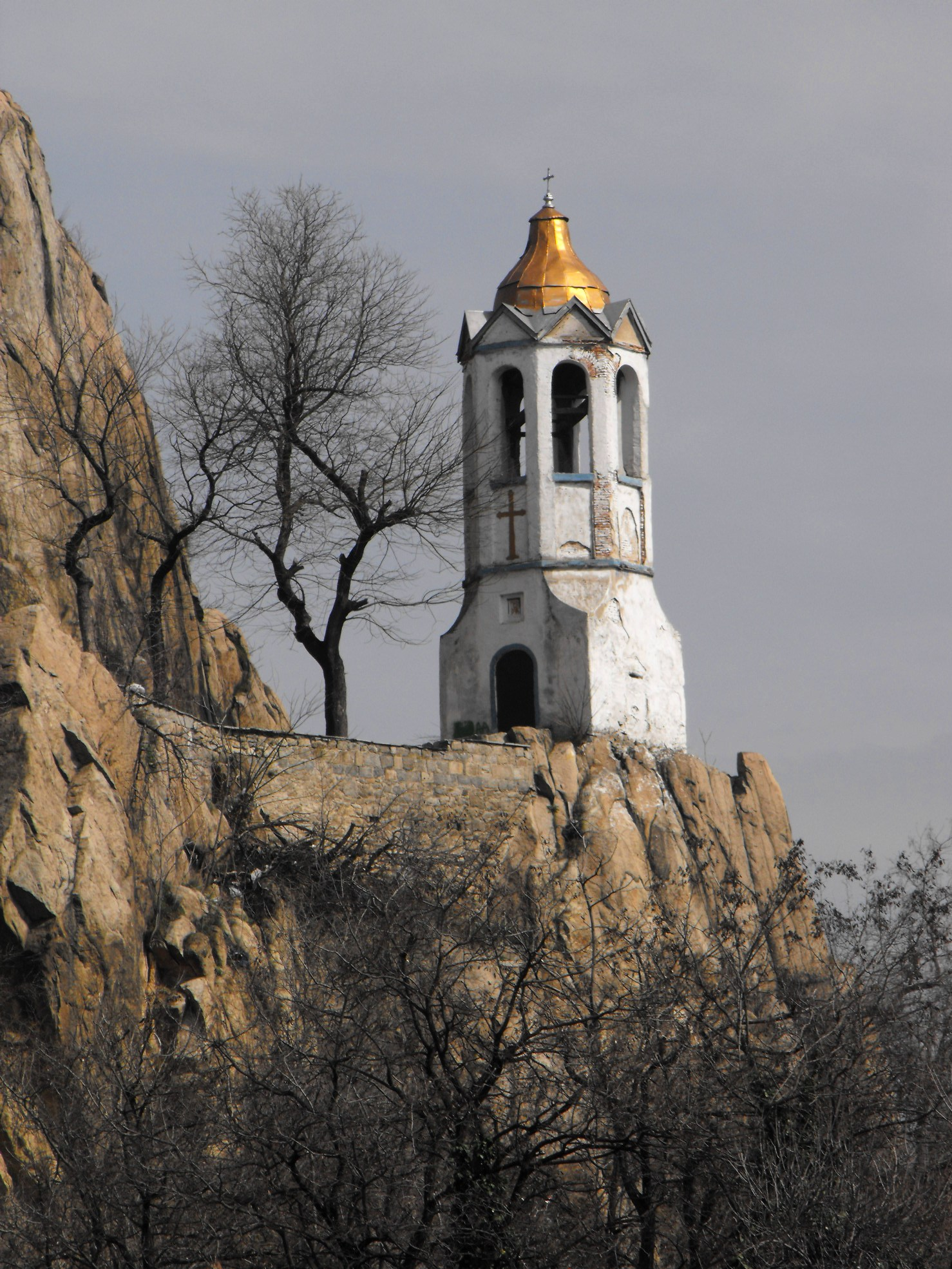 Старинен Пловдив